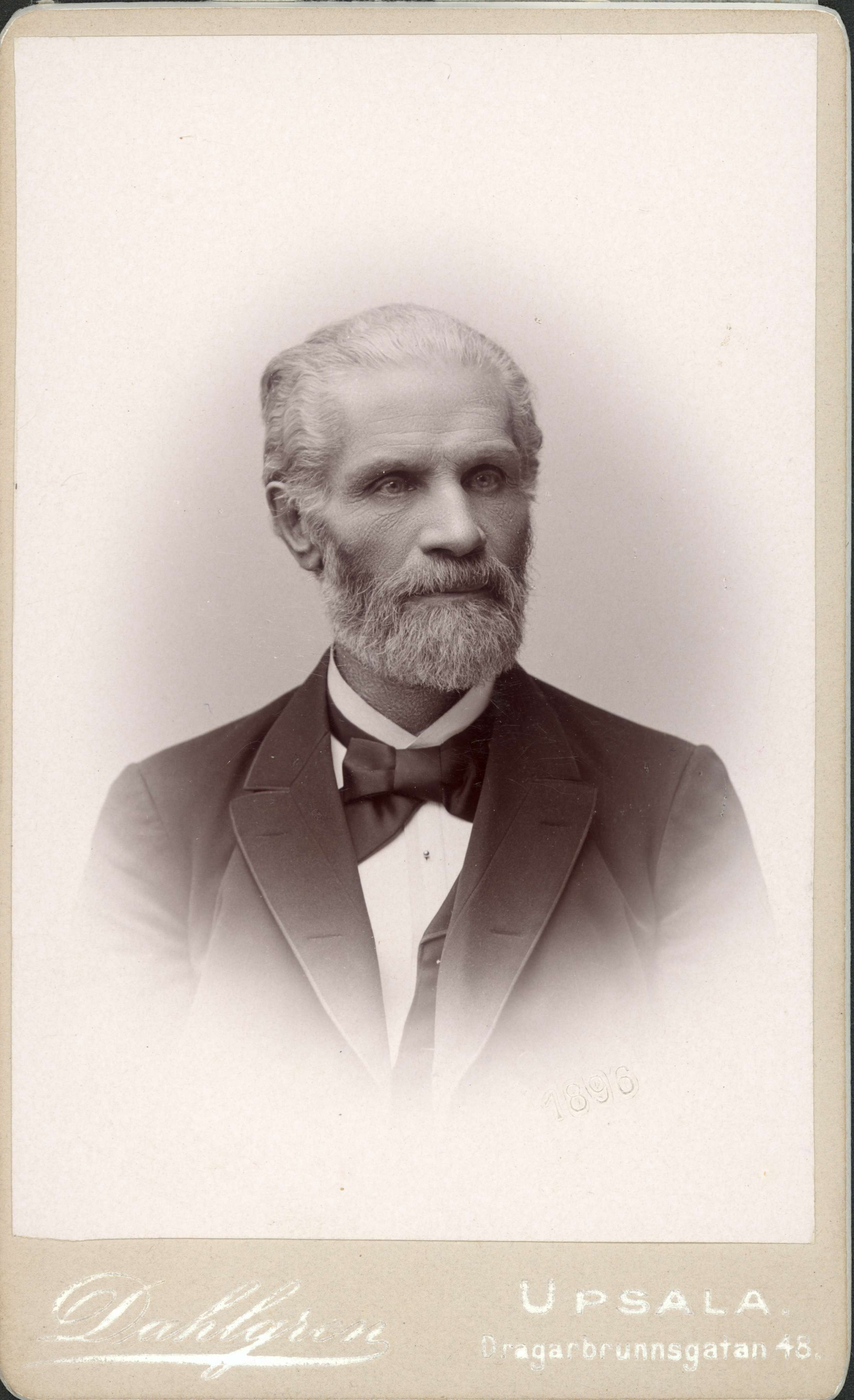 Foto: Alfred Dahlgren. Bildnr: NMA.0034747. Länk till Digitalt museum